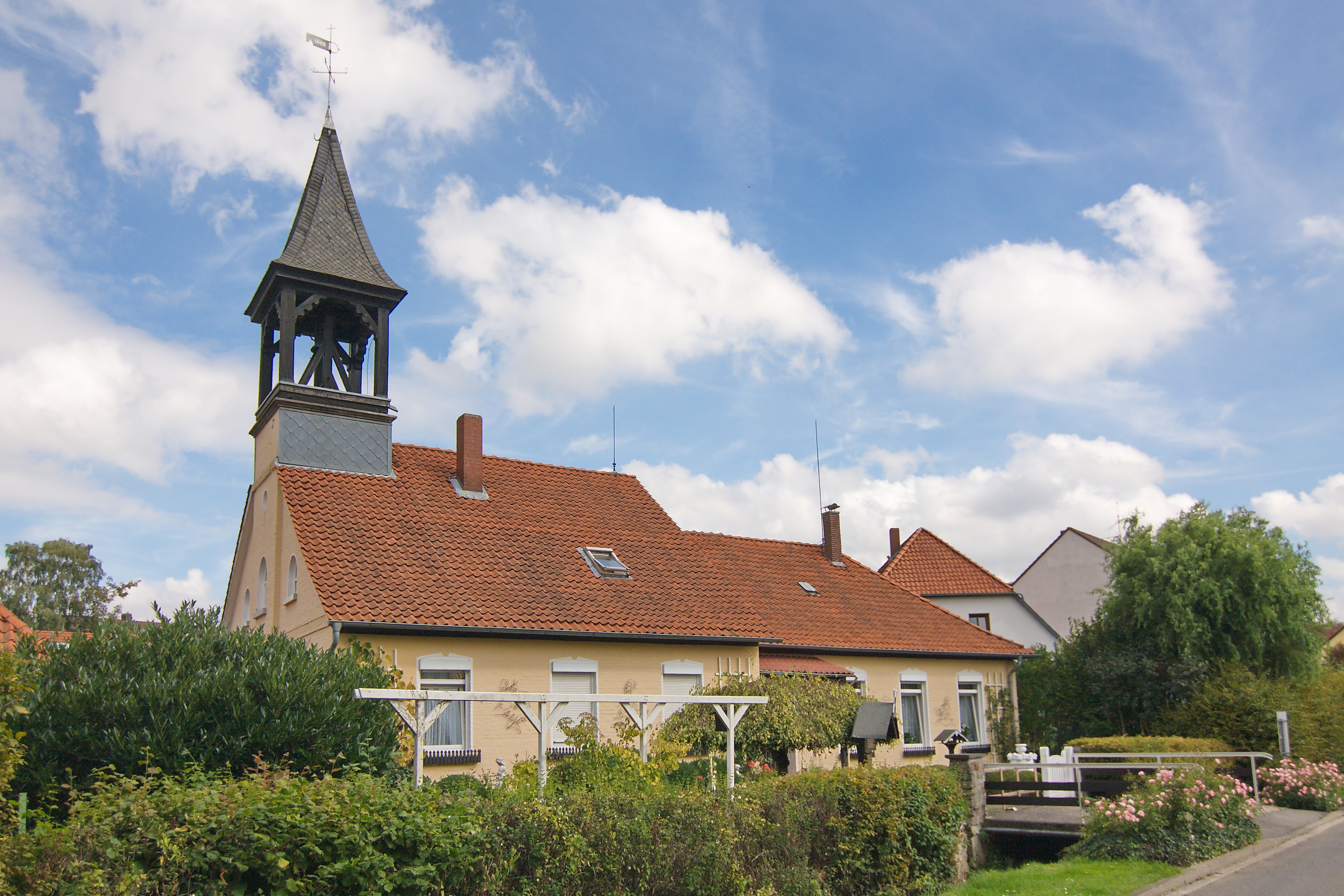 Altes Schulhaus von 1848 in Bredenbeck (Wennigsen), Niedersachsen, Deutschland